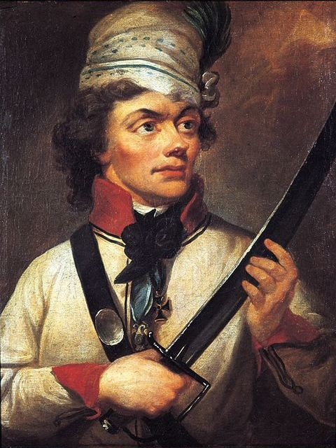 Беларуская (тарашкевіца): Тадэвуш Касьцюшка